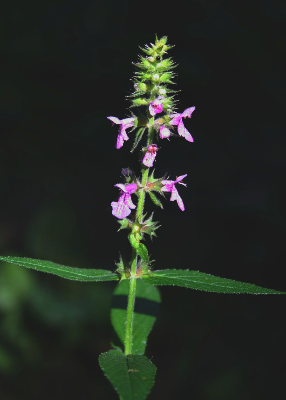 Sumpf-Ziest (Stachys palustris), Lippenblütler (Lamiaceae) - Österreich/Austria/Autriche: Niederösterreich, Wiener Becken, SE Leobersdorf